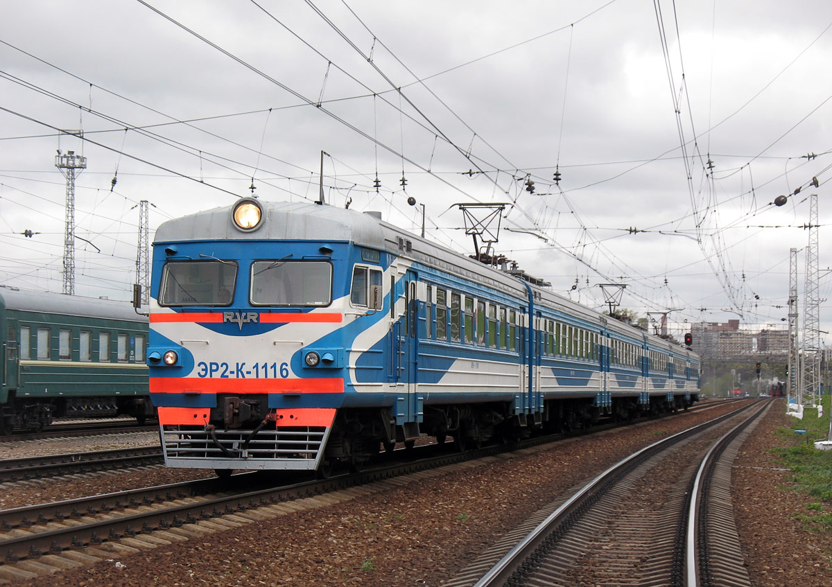 Построен в 10-вагонной составности С завода поступил в депо Раменское, работал с секцией 208702-208703 В декабре 2003 г. передан в депо Рыбное В июне 2005 г. передан в депо Лобня; работал на маршруте Москва — Лобня (экспресс) Летом-осенью 2005 г. периодически был в аренде депо им. Ильича для подмены экспрессов сообщением Москва — Одинцово В январе 2006 г. передан в депо Апрелевка; работал на маршруте Москва-Киевская — Аэропорт Внуково Летом 2009 г. переведён на обычные маршруты в окружной график 07.2016 — передан в депо Новомосковск-1 Мск КРП Московский ЛРЗ 2005 г. (вагоны 01, 02, 03, 04, 10, 09); переоборудован в поезд повышенной комфортности с вагонами 2-го класса Вагоны 111605-111606 и 111607-111608 использованы ЗАО "Спецремонт" при постройке вагонов ЭМ4-00805-00806 и ЭМ4-00905-00906 соответственно ТР-3 в ТЧ-7 Раменское 2010 г.; Перекрашен в зелёный цвет КР-1 Московский ЛРЗ 2012 г.; Перекрашен в корпоративные цвета ОАО "РЖД" ТР-3 в ТЧ-10 Москва-II 02.2015 г.